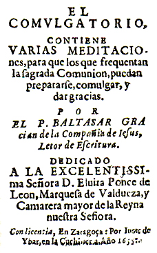 Descripción sintética Baltasar Gracián, El Comulgatorio, Zaragoza, Juan de Ibar, 1655. Descripción analítica: EL/ COMULGATORIO,/ CONTIENE / VARIAS MEDITACIO-/ nes, para que los que frequentan/ la sagrada Comunion, puedan/ prepararse, comulgar, y/ dar gracias. / POR/ EL P. BALTASAR GRA/cian de la Compañia de Iesus,/ Letor de Escritura./ DEDICADO/ A LA EXCELENTISSI-/ma Señora D. Eluira Ponce de/ Leon,Marquesa de Valdueza,y/ Camarera mayor de la Reyna/ nuestra Señora./ Con licencia, En Zaragoça : Por Iuan de/ Ybar,en la Cuchiller.a.Año 1655.